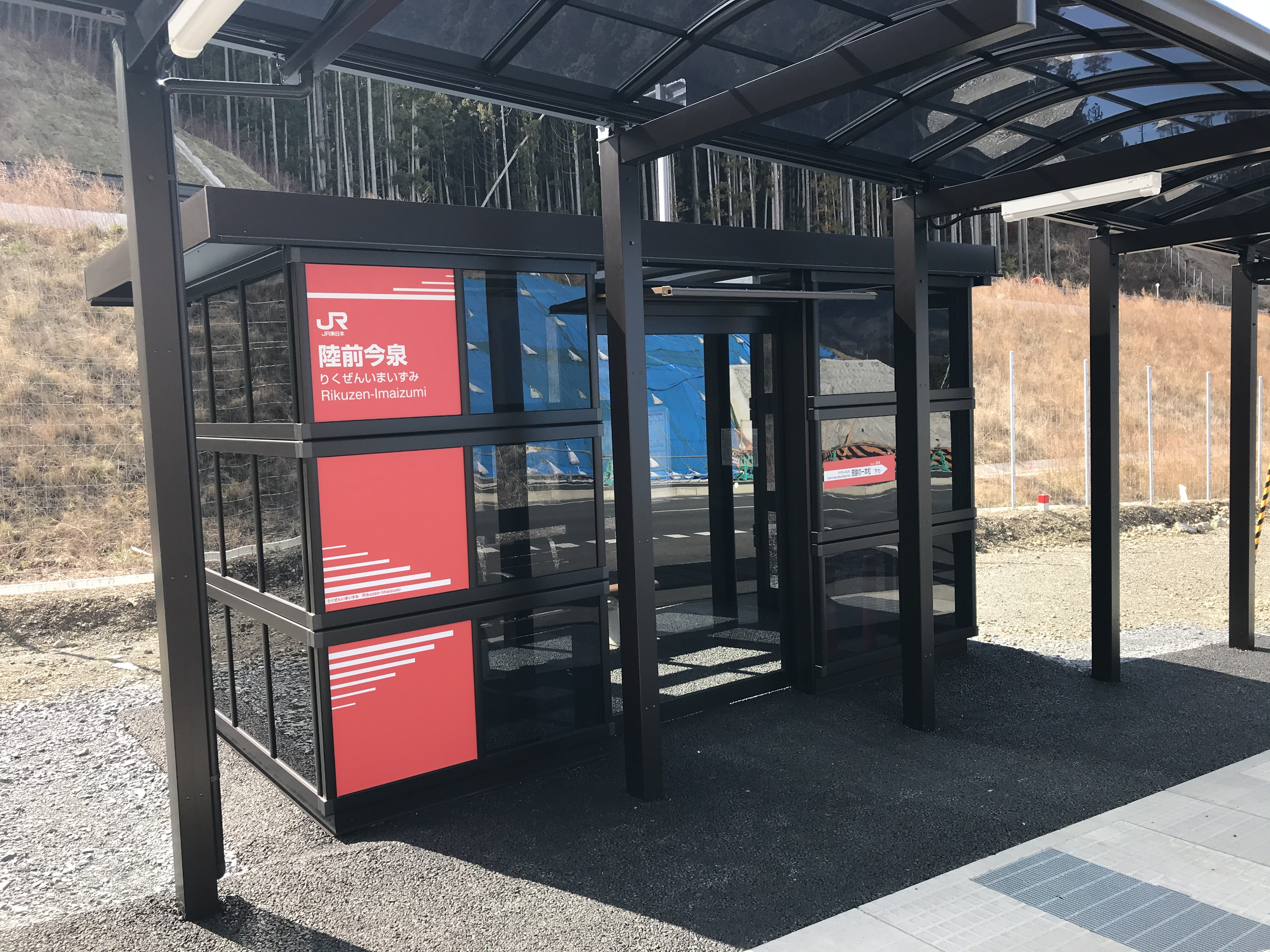 JR東日本のBRT大船渡線の陸前今泉駅